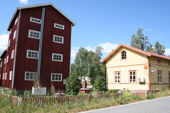 Ypäjällä mylly ja myllytupa